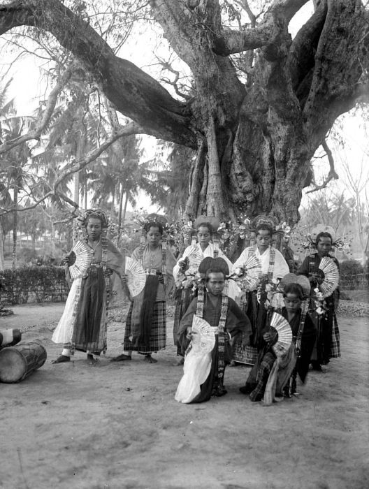 Negatief. Danseressen te Singkang, Celebes